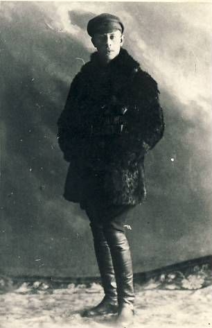 Командир 3-го Тартуского стрелкового полка Эстонской Красной Армии Аугуст Лиллакас